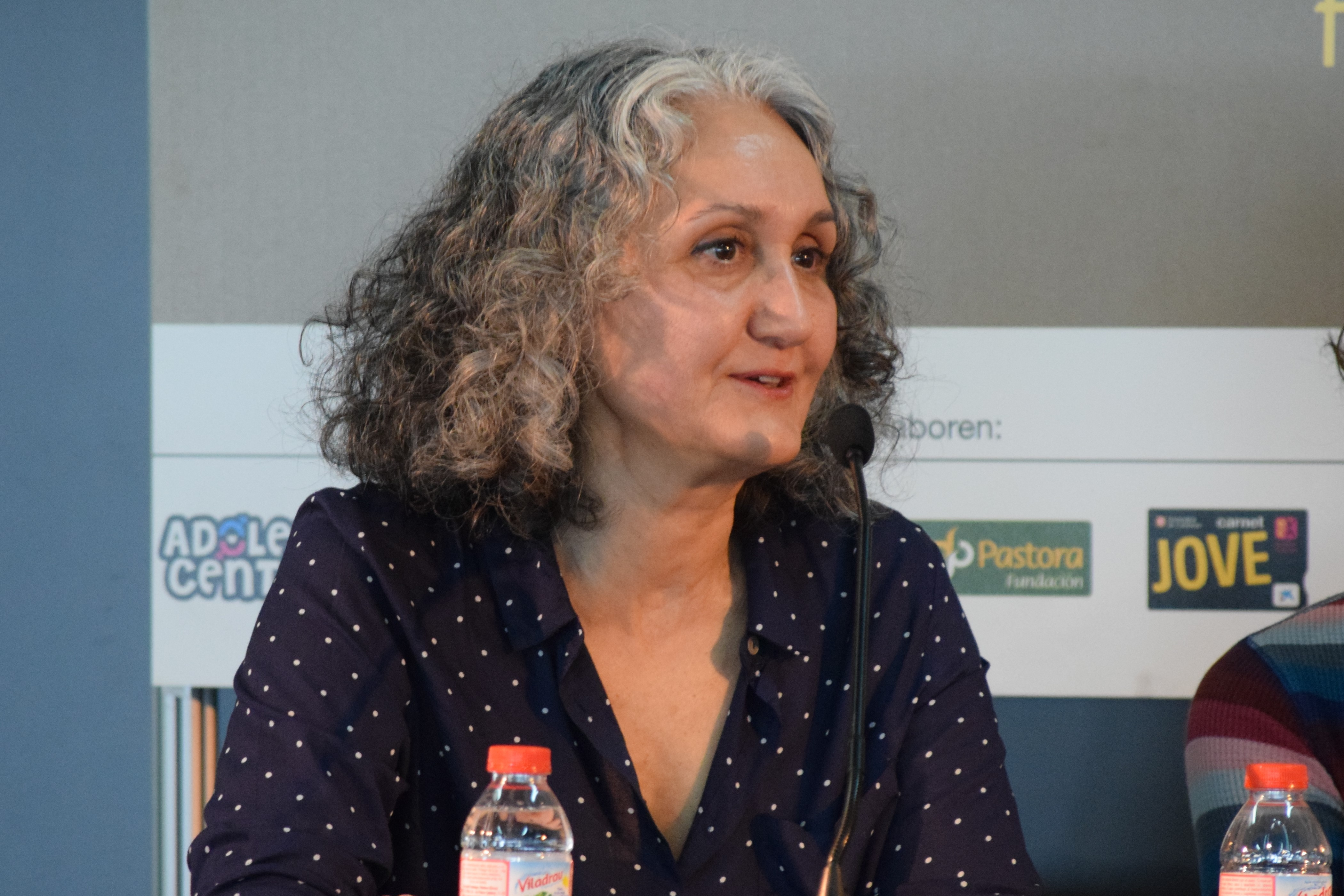 La il·lustradora Ana Miralles parlant a la taula rodona "Dones, la baula perduda del còmic". Saló Internacional del Còmic de Barcelona de 2017. Dijous 30 de març de 2017.